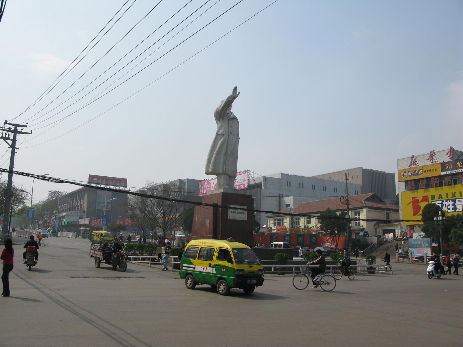 毛主席像